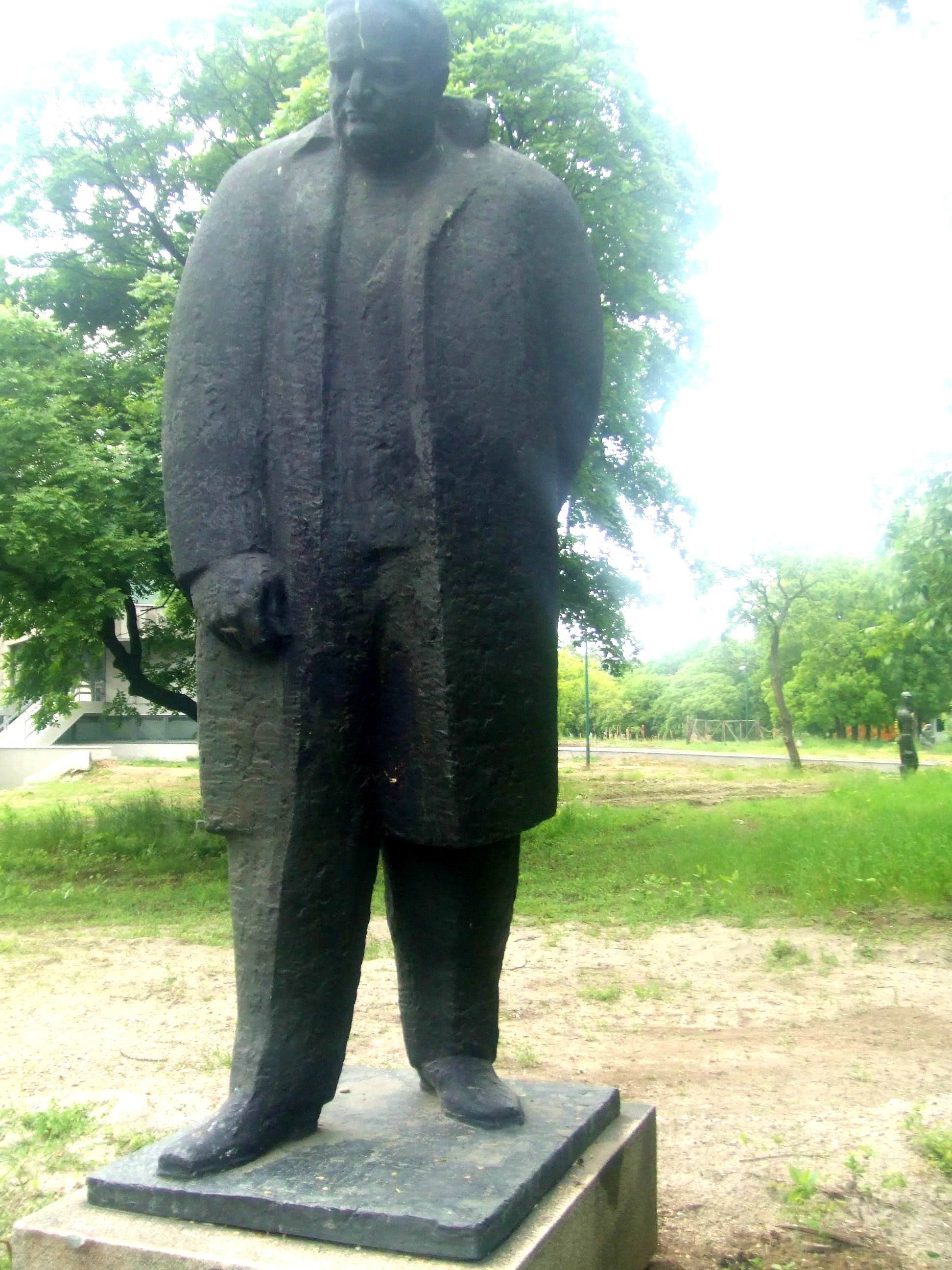 Nikola Koka Janković, Boris Kidrič, 1963, Beograd. Moj fajl.